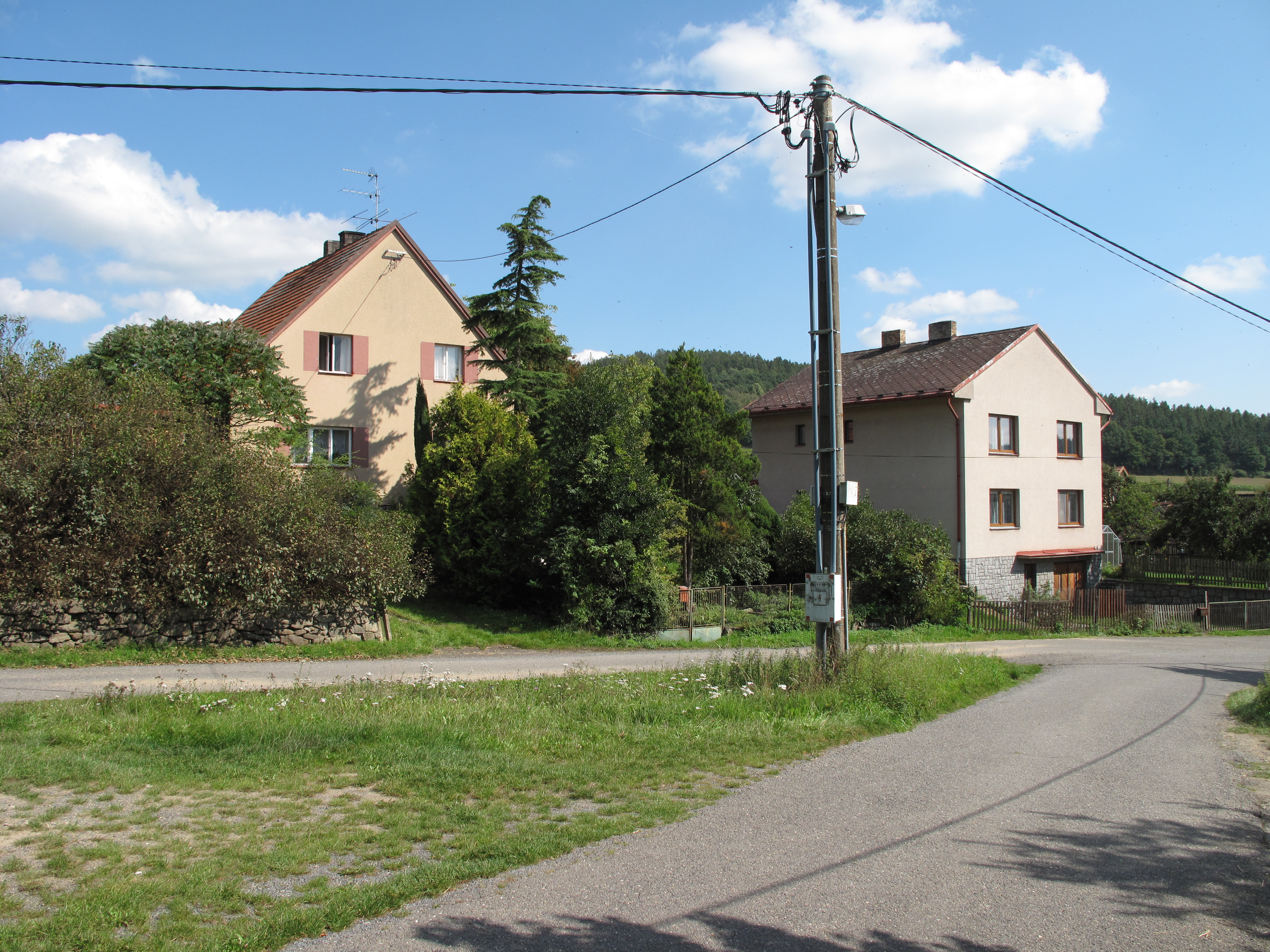 Domy v Dalešicích. Okres Benešov, Česká republika.